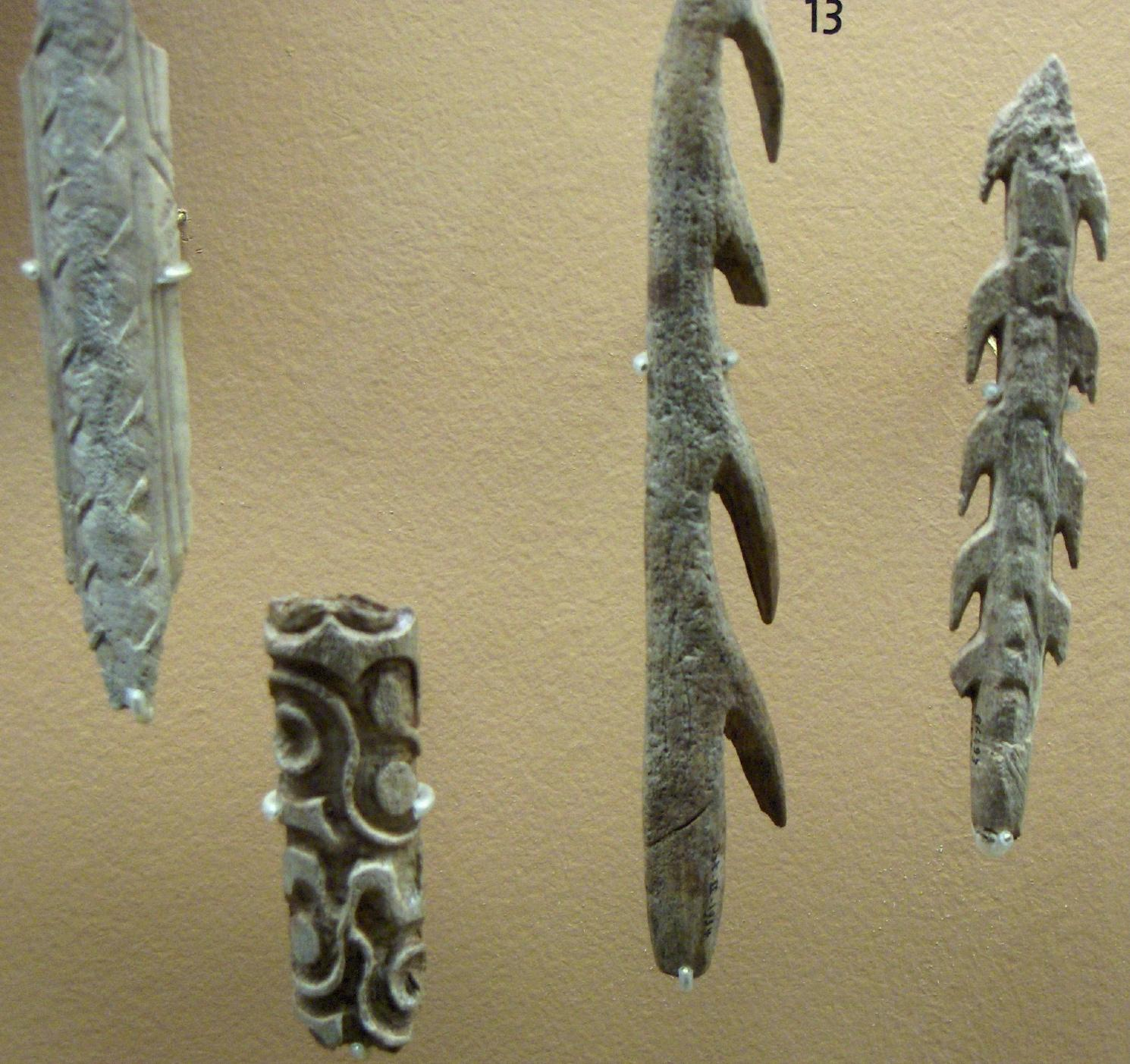 Harpons et os sculptés, os, paléolithique, musée des antiquités nationales, Saint-Germain-en-Laye